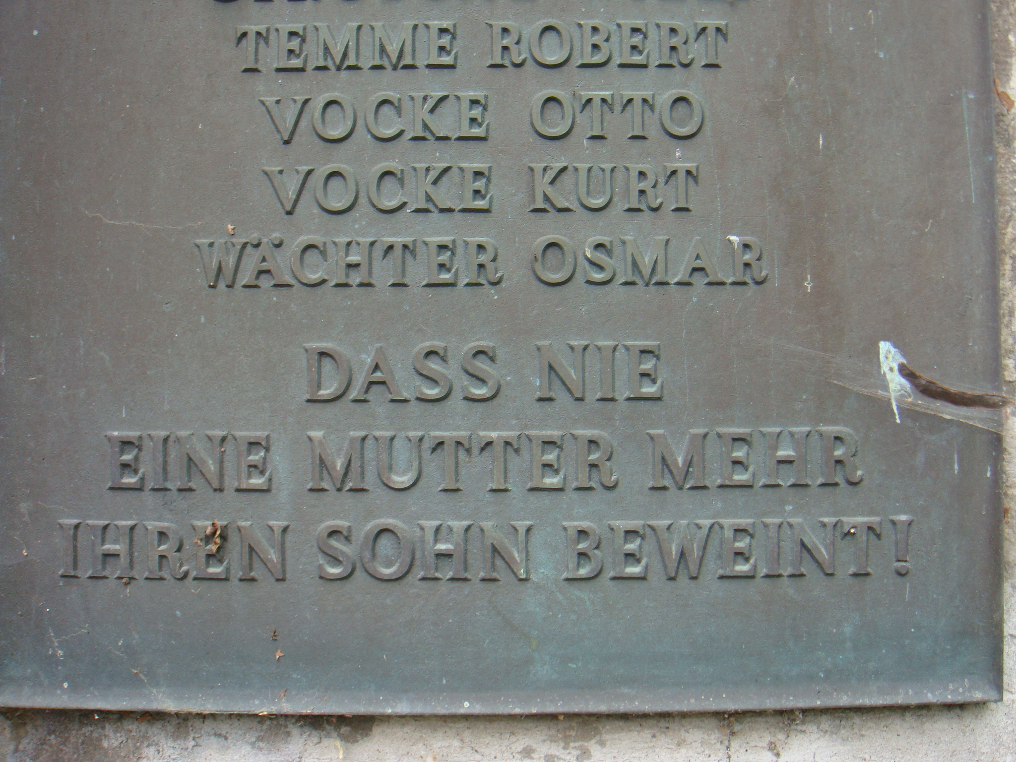 Ausschnitt aus der Tafel am Kriegerdenkmal in Kleinbrembach (Veränderte Sinngebung mit Text aus der DDR-Nationalhymne)